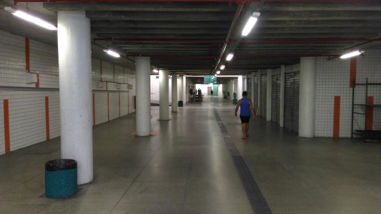 Túnel de ligação entre as plataformas do Terminal do Antônio Bezerra.